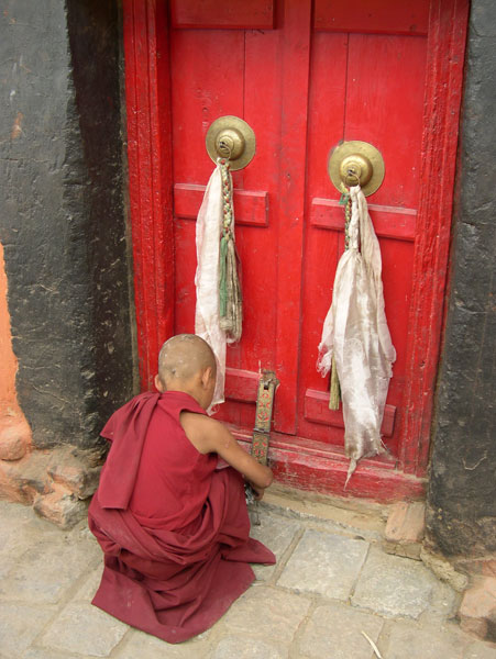 Phyang Gompa, Ladakh, India